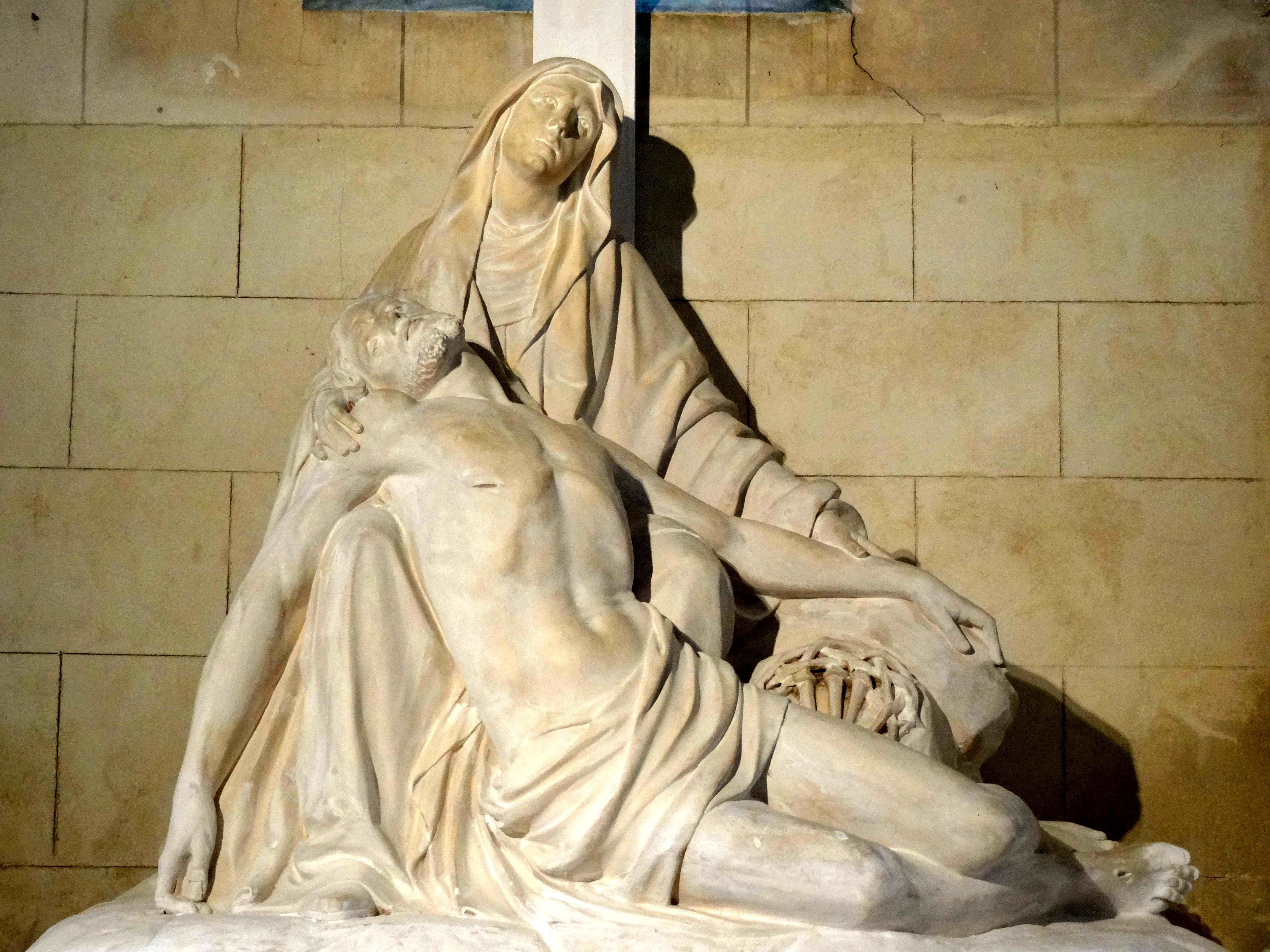 Pietà.